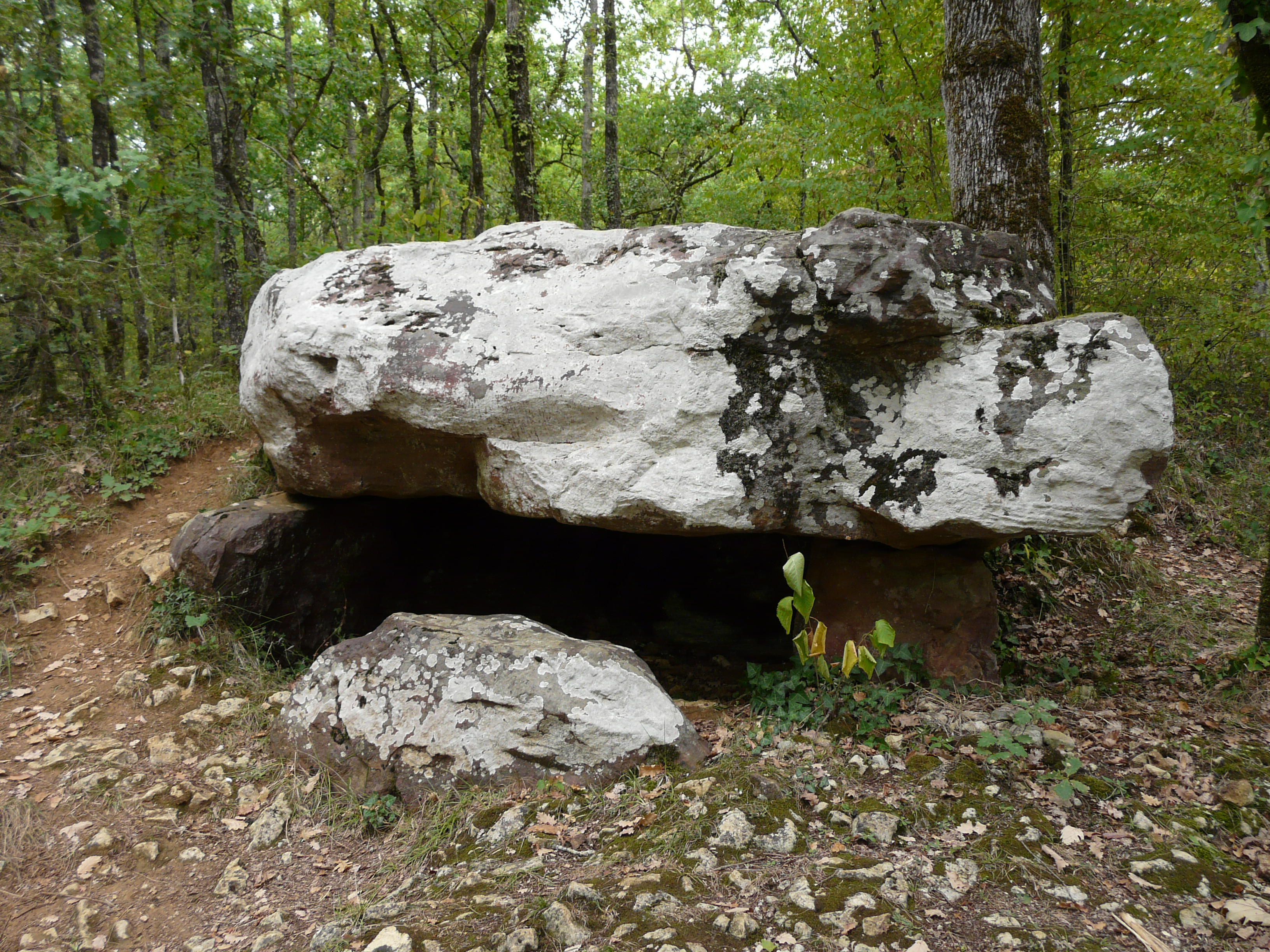 Le dolmen de Cantegrel, Saint-Chamassy, Dordogne, France. .